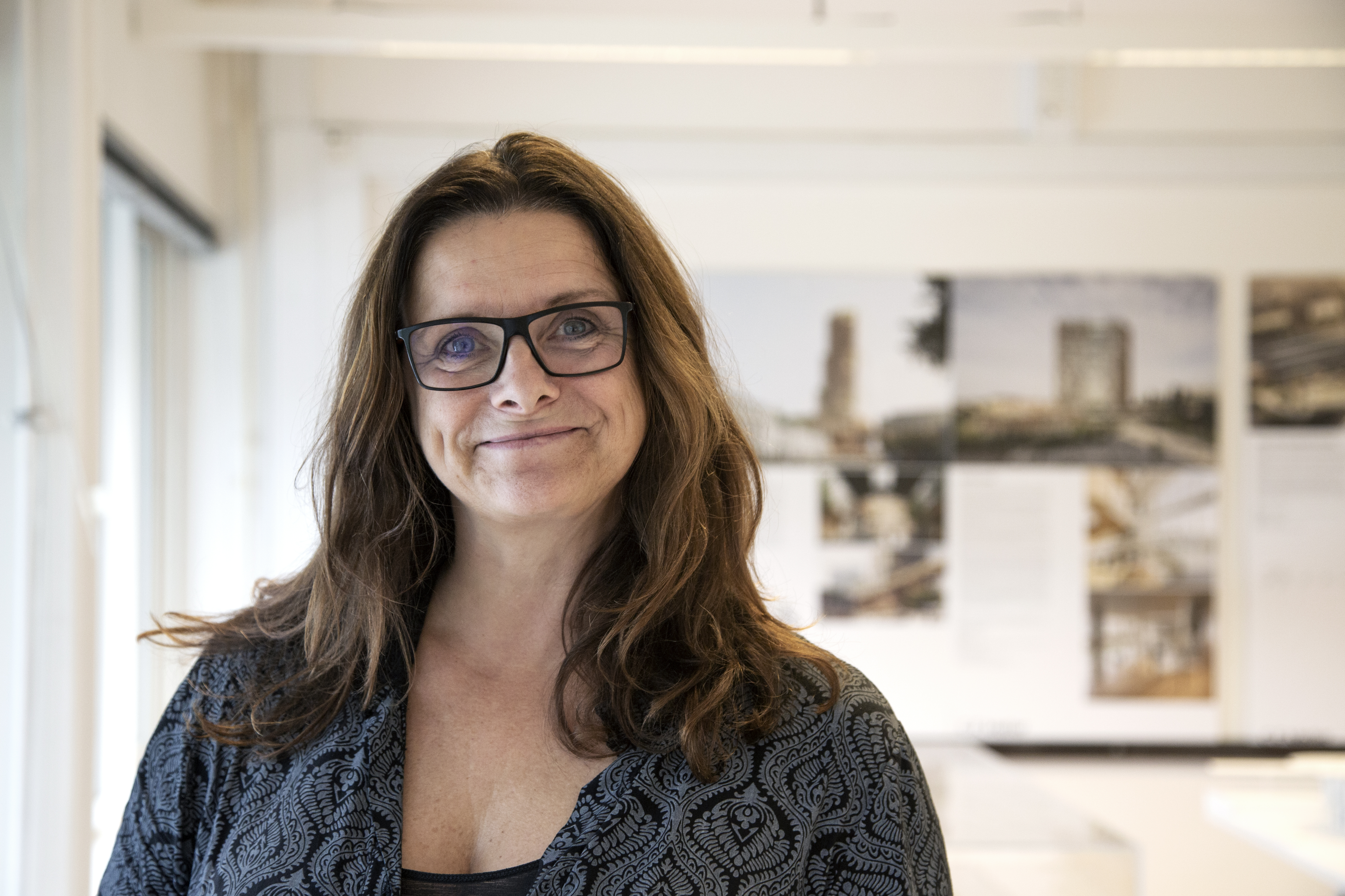 Lone Wiggers, arkitekt och partner C.F. Møller Architects, 2019-09-10. Photo: News Øresund - Jenny Andersson © News Øresund - Jenny Andersson (CC BY 3.0). Detta verk av News Øresund är licensierat under en Creative Commons Erkännande 3.0 Unported-licens (CC BY 3.0). Bilden får fritt publiceras under förutsättning att källa anges. .The picture can be used freely under the prerequisite that the source is given. News Øresund, Malmö, Sweden News Øresund är en oberoende regional nyhetsbyrå som är en del av det oberoende dansk-svenska kunskapscentrat Øresundsinstituttet.. .